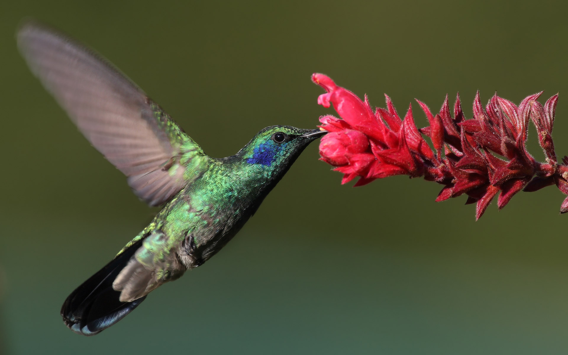 Green Violet-Ear -- Finca Lerida, Boquete, Panama -- 2008 January